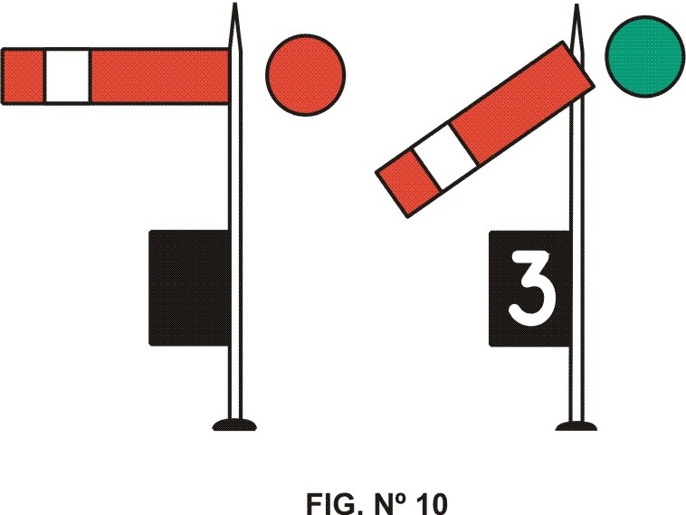 Es un dibujo de dos señales ferroviarias argentinas, con indicador de ruta.